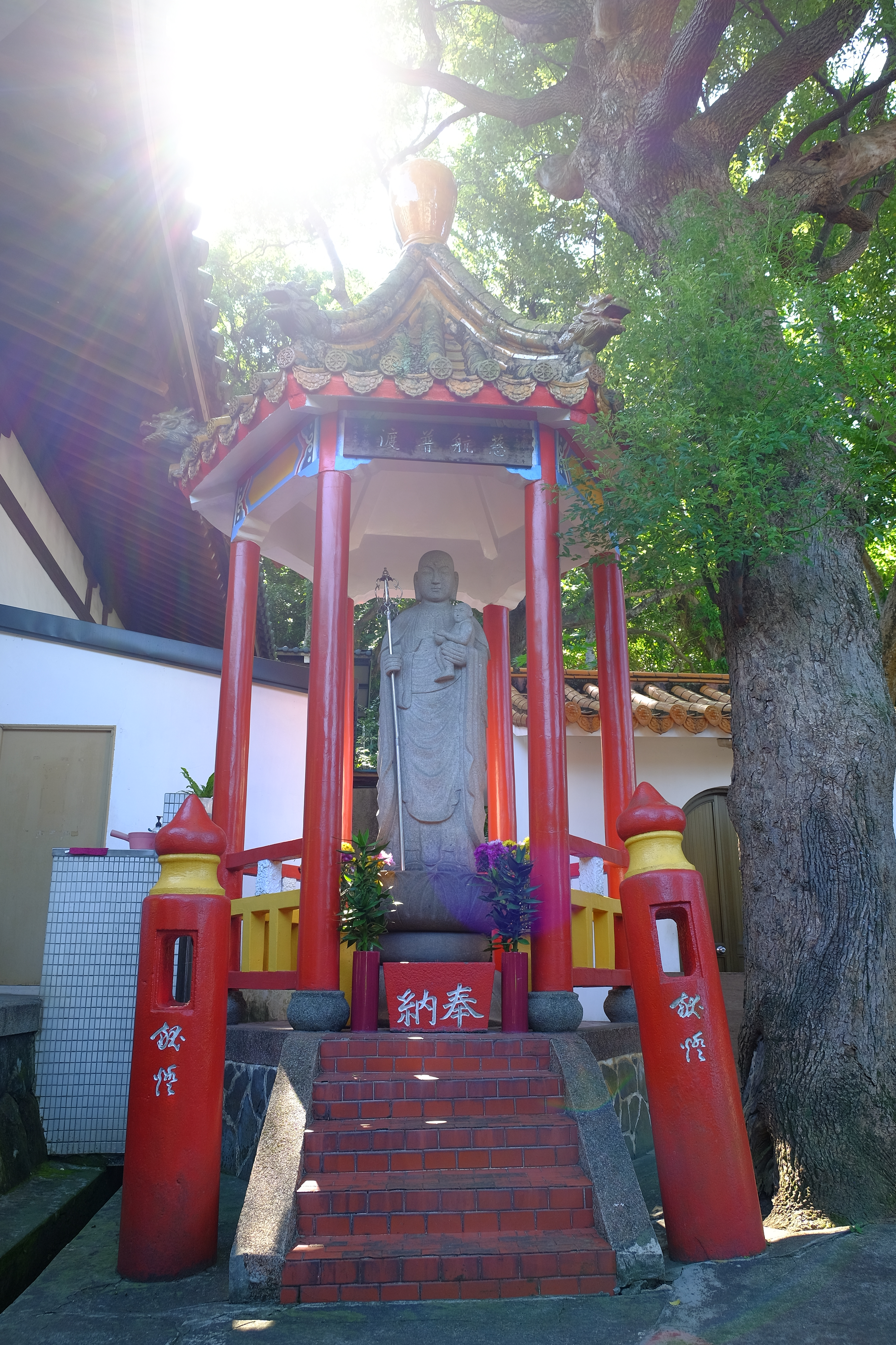 2017Puji Temple Taipei子安地藏(昭和5年)